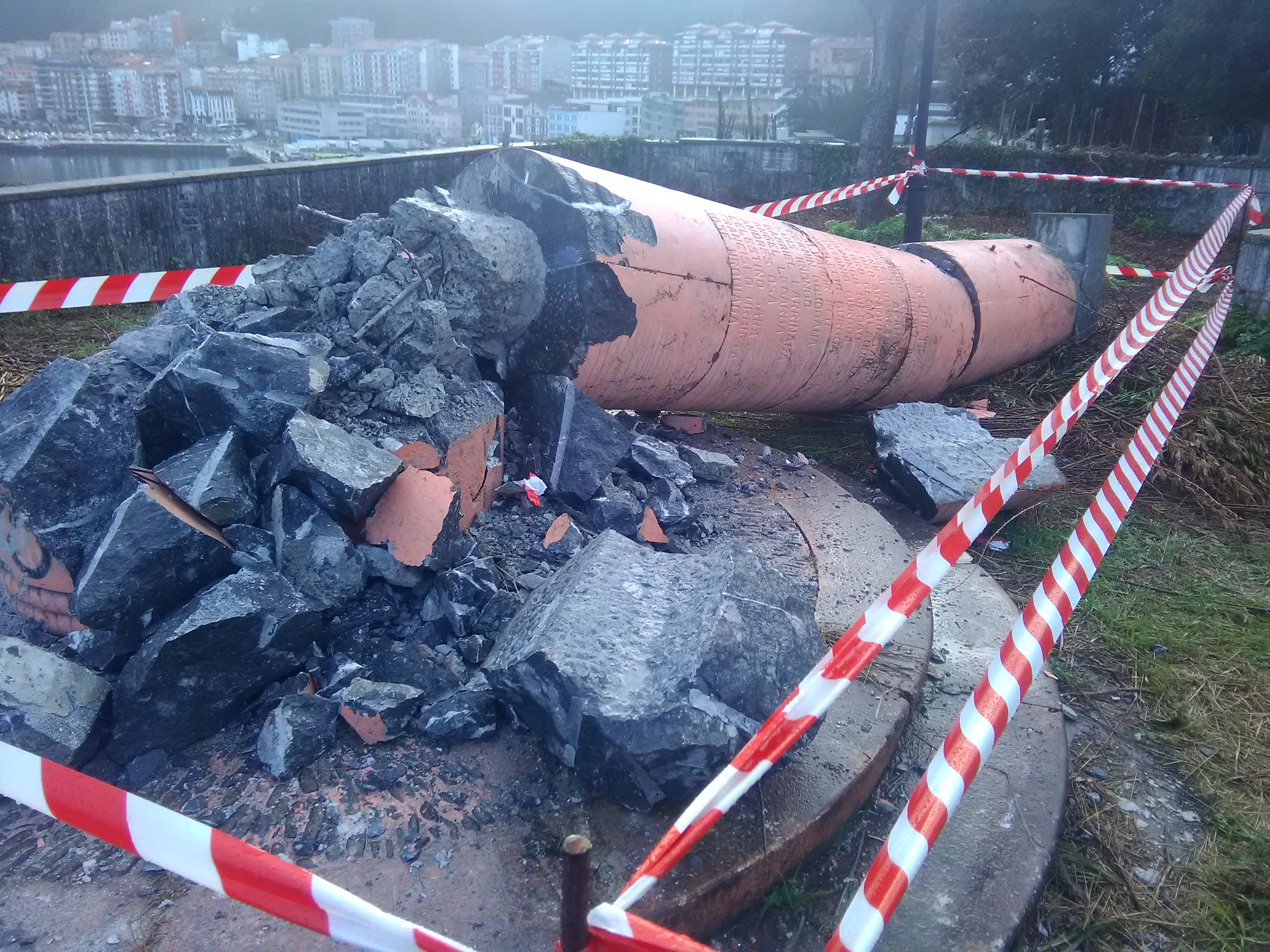 Baleares gurutze-ontzian 1938an hildako errekete ondarroarren omenezko gurutzea Ondarroako Arta Puntan, 2019 urtean.